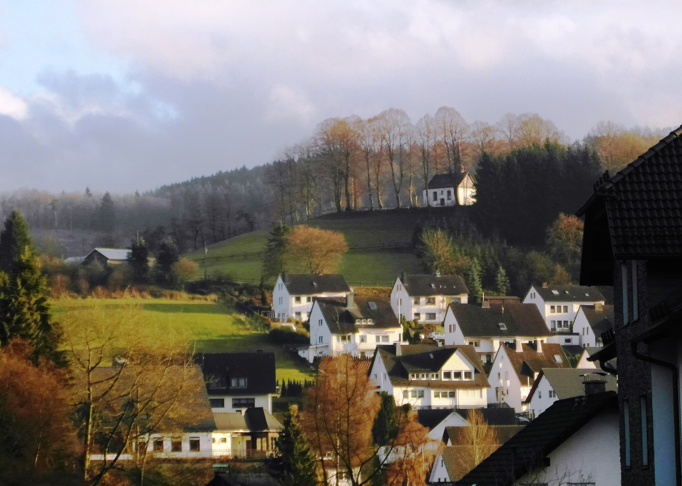 Sankt Johannes-Baptist auf dem Oedingerberg aus Sicht der Bundesstraße 55, von Eslohe kommend